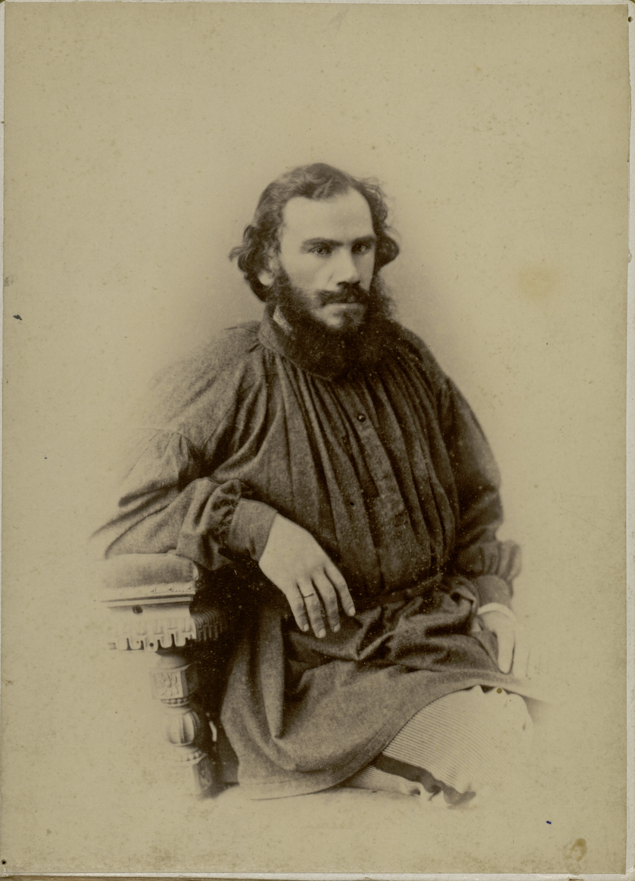 Л.Н. Толстой. Профессиональная фотография. Поколенный портрет Л.Н. Толстого, с бородой, 3/4 вправо, в тёмной блузе и светлых брюках с тёмной полоской по шву. На светлом фоне. Сидит в кресле, положив локоть правой руки на резной подлокотник, левая рука – на талии. На безымянном пальце правой руки – обручальное кольцо. Изображение ретушировано по краям. Фотография выполнена в период работы писателя над романом «Война и мир». 1868 г., Город Москва